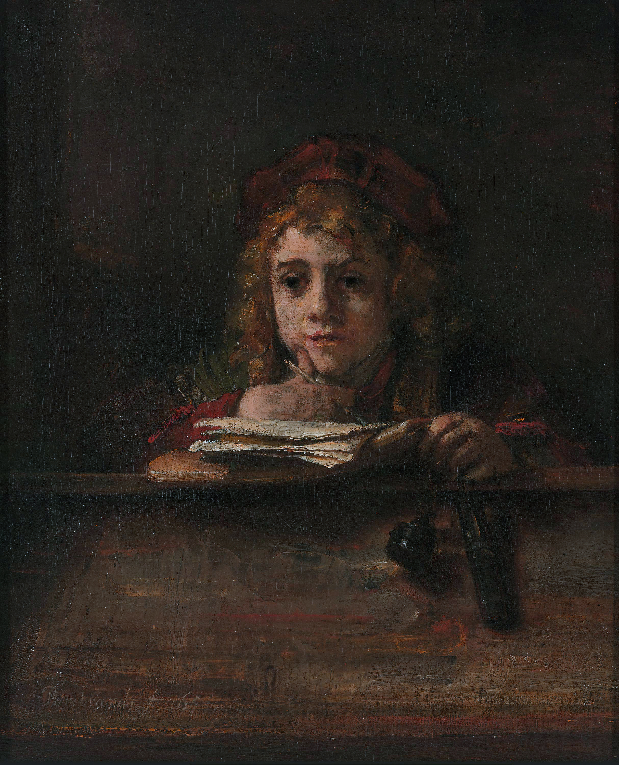 Portrait of Titus van Rijn (1641-1668), Rembrandt's son with Saskia van Uylenburgh.